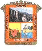 Stemma Momax Zacatecas